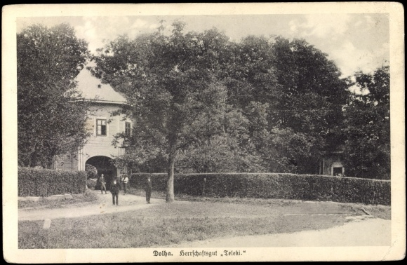 Палац-фортеця Телекі. Листівка поч. XX ст.